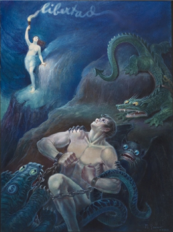 Cuadro de Manuel Gallur Latorre